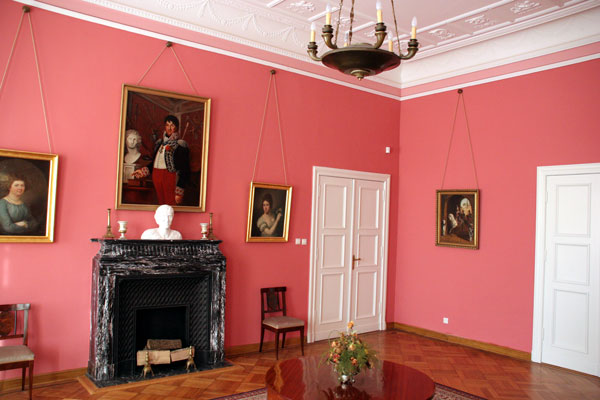 Sala pamięci gen. J.H. Dąbrowkiego w pałacu w Winnej Górze.